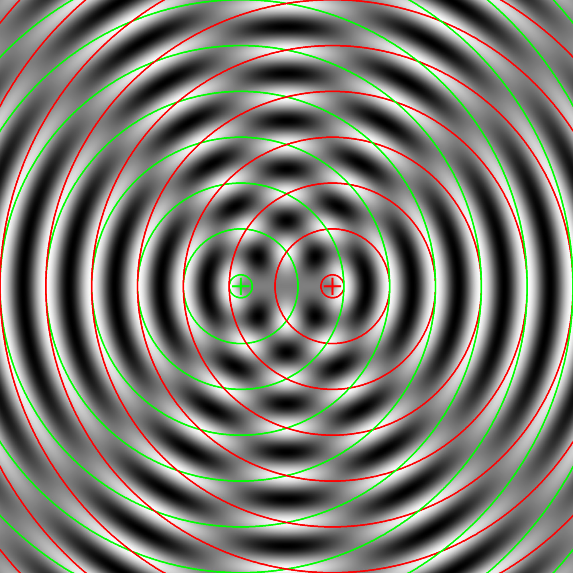 Simuliertes Interferenzbild zweier punktförmiger Quellen mit gleicher Wellenlänge. Die Lagen der Quellen sind durch Kreuze gekennzeichnet, die Maxima beider Wellen durch farbige Kreise.